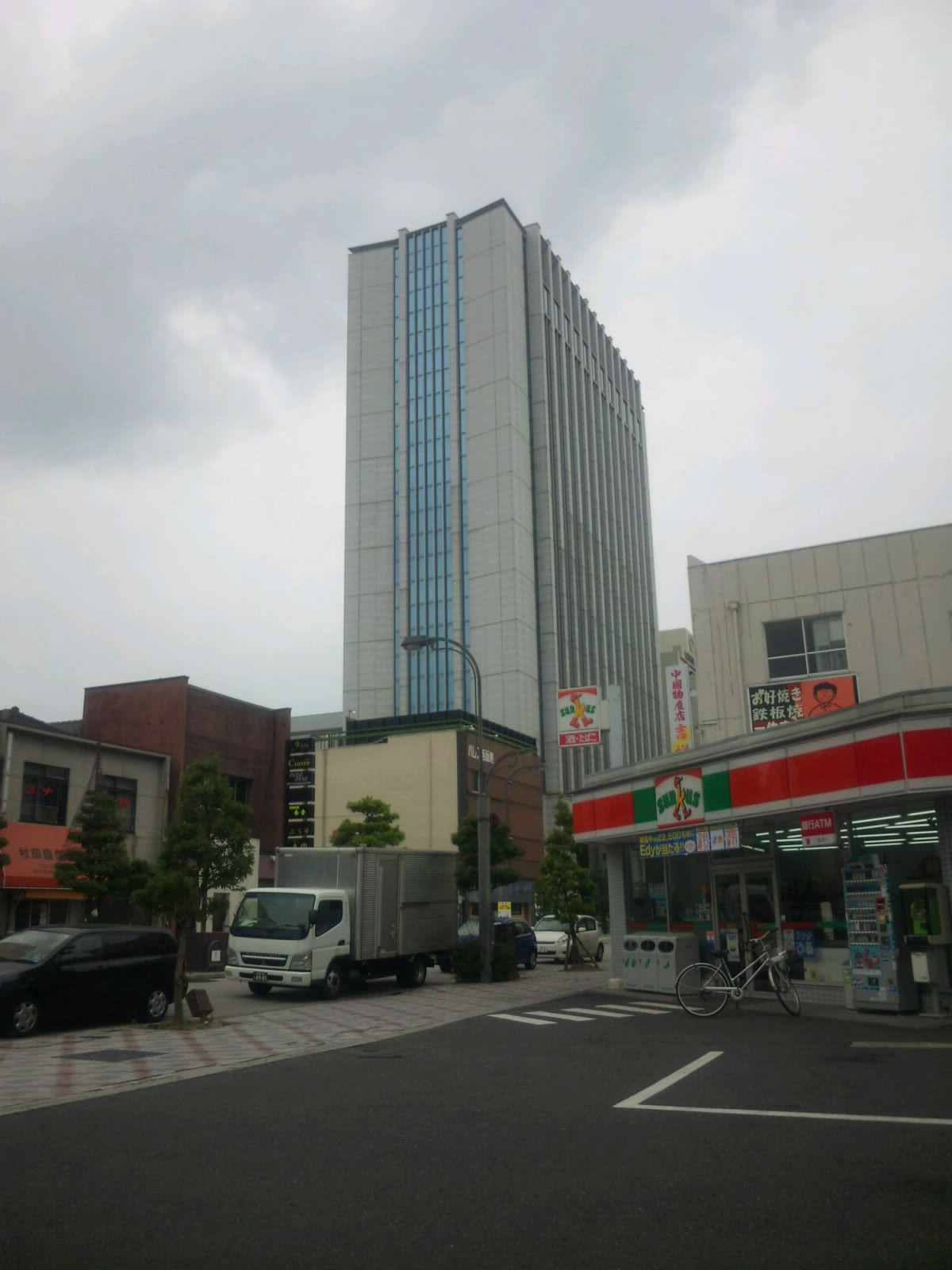 四日市市西新地にある三重銀行本店